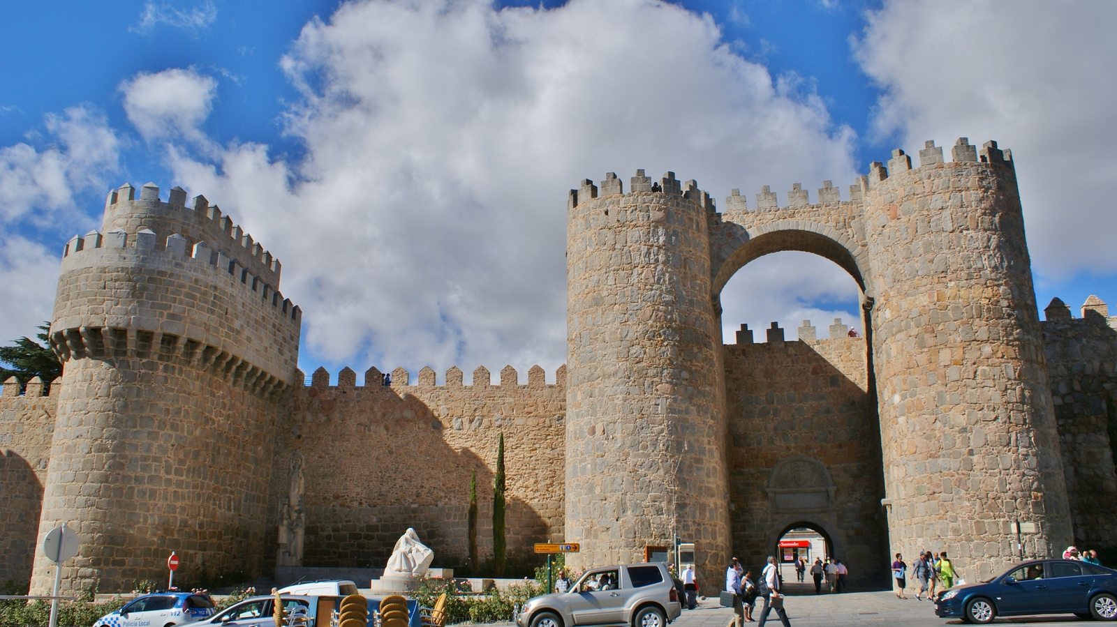 La Muralla de Ávila es una cerca militar románica que rodea el casco antiguo de la ciudad, siendo su símbolo y monumento más destacado.Tiene un perímetro de 2.516 m, 2.500 almenas, 88 cubos o torreones y 9 puertas. En el siglo XIV se la hicieron reformas para reforzarla. Es el recinto amurallado medieval mejor conservado de España. Ávila, Comunidad Autónoma de Castilla y León